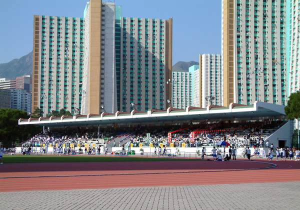 Sportstadion in Hongkong 屯門鄧肇堅運動場看台